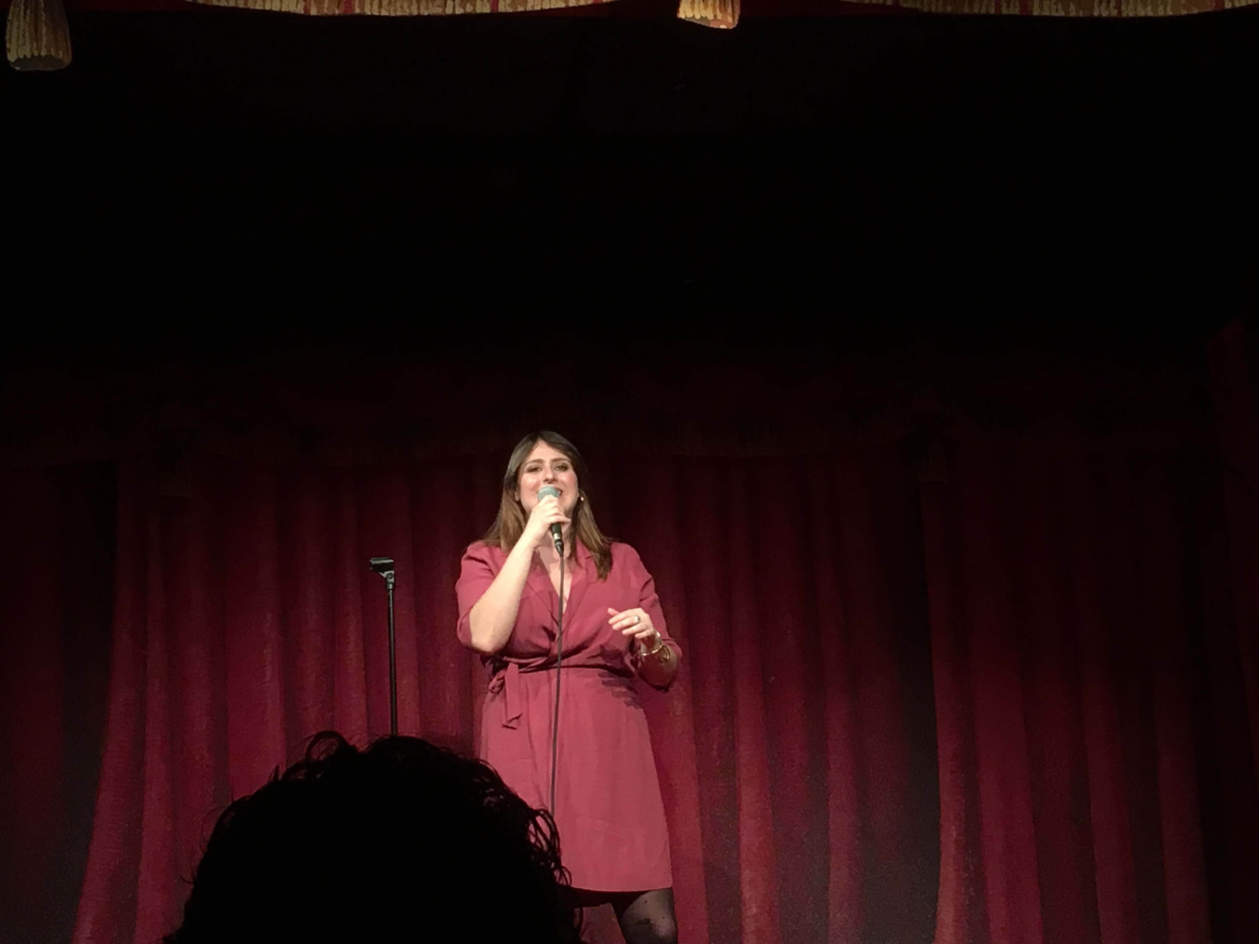 Michela Giraud al Teatro Franco Parenti durante uno spettacolo di Stand-up Comedy